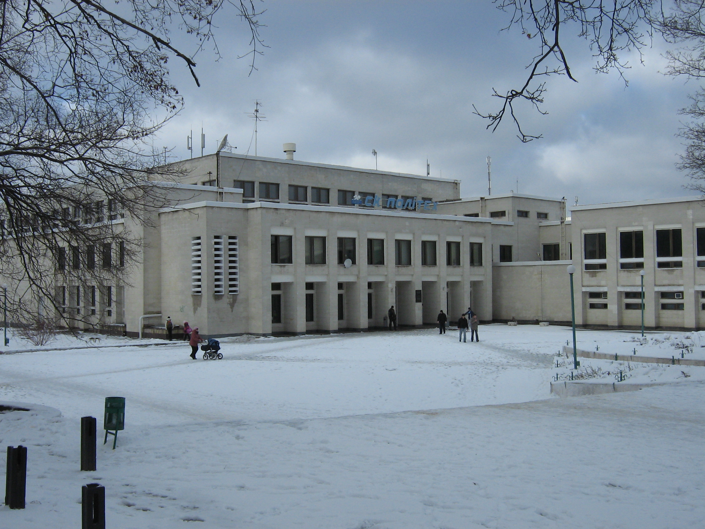 Palace Sports Institute. The huge building where classes are held, hundreds of Physical Education. Дворец спорта ХПИ, Харьков. Оф. адрес - улица Артёма. Реальное расположение - Молодёжный парк. Построен на месте Иоанно-Усекновенского кладбища в 1980-х.